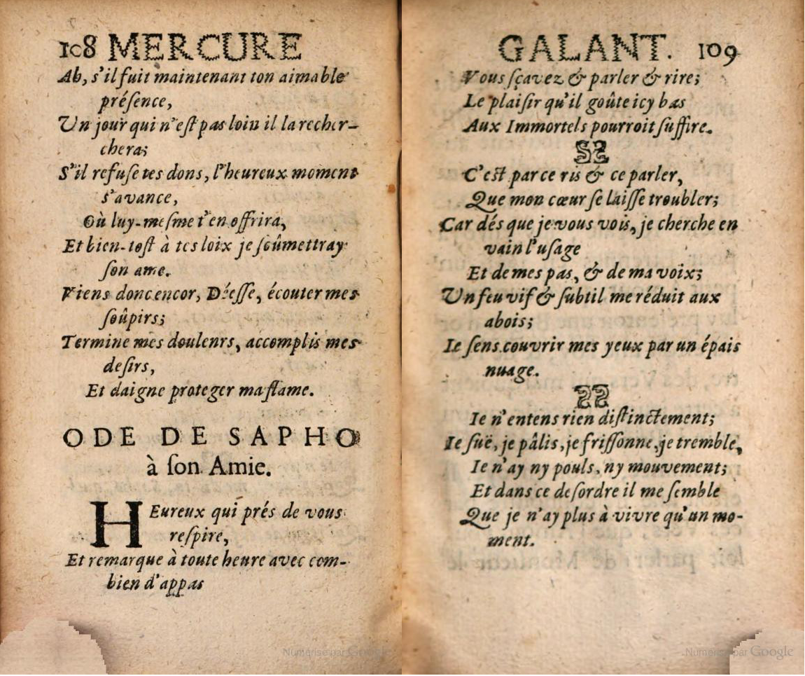 Mercure galant - juillet 1684, pages 108-109. Ode de Sapho à son amie, traduction anonyme.